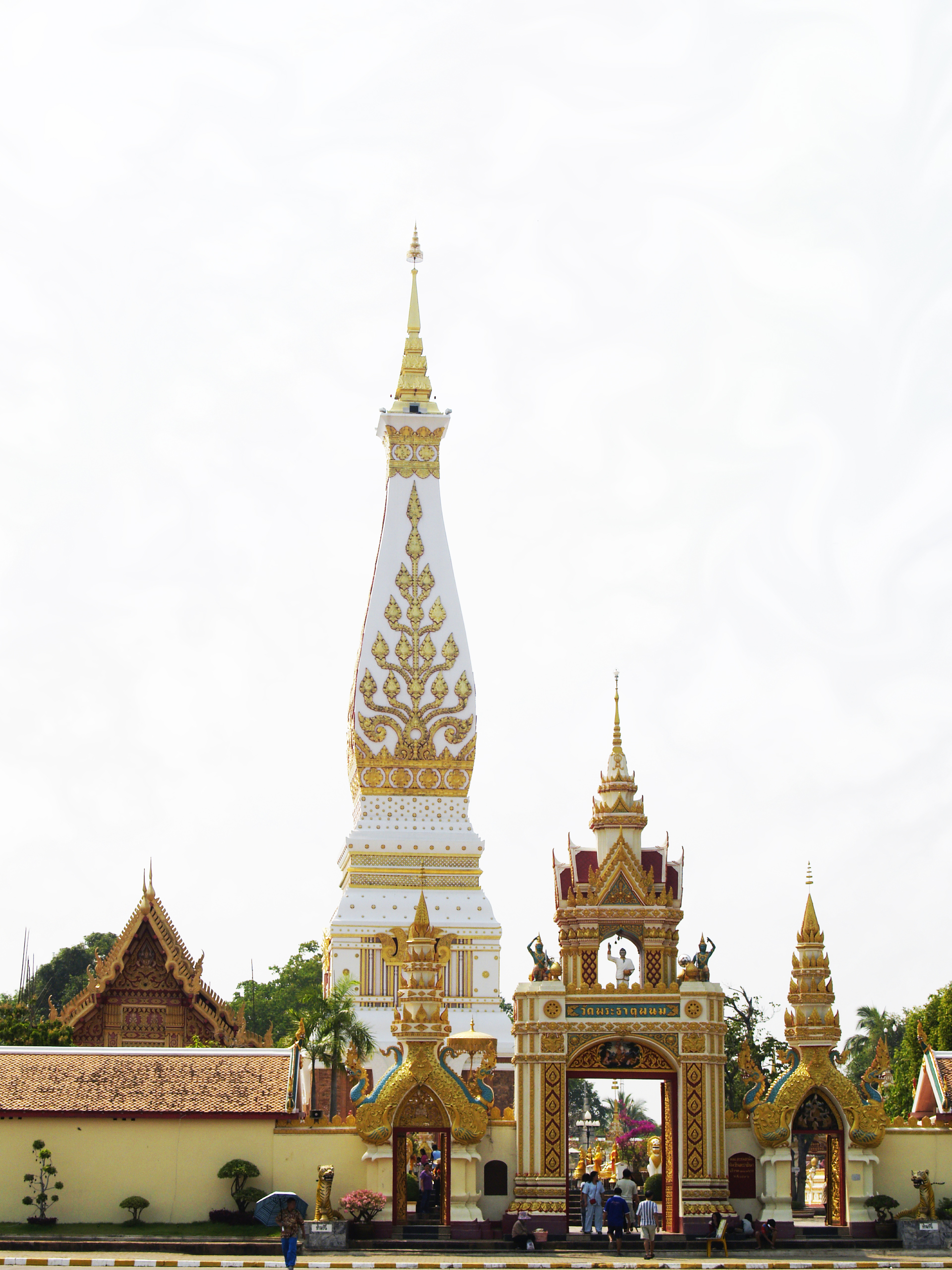 วัดพระธาตุพนมวรมหาวิหาร(พระธาตุพนม)